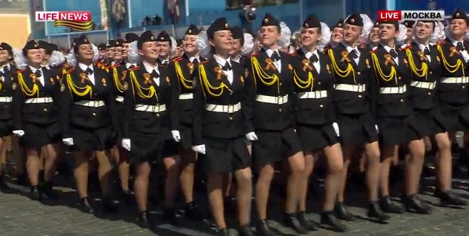 Парад Победы 9 мая 2015 г.